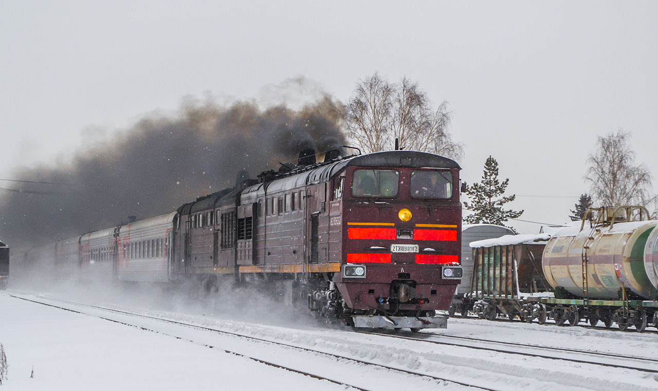 07.2015 — гибрид 2ТЭ10У-0182А/0214А, 2ТЭ10У-0182Б/0214Б 01.2016 — гибрид 2ТЭ10У-0182А/0213Б КР 05.2004 г. СР 03.2011 г. ТР-3 08.2013 г. 09.2017 — ТР-3 СЛД "Моршанск", перекрашен в корпоративные цвета РЖД